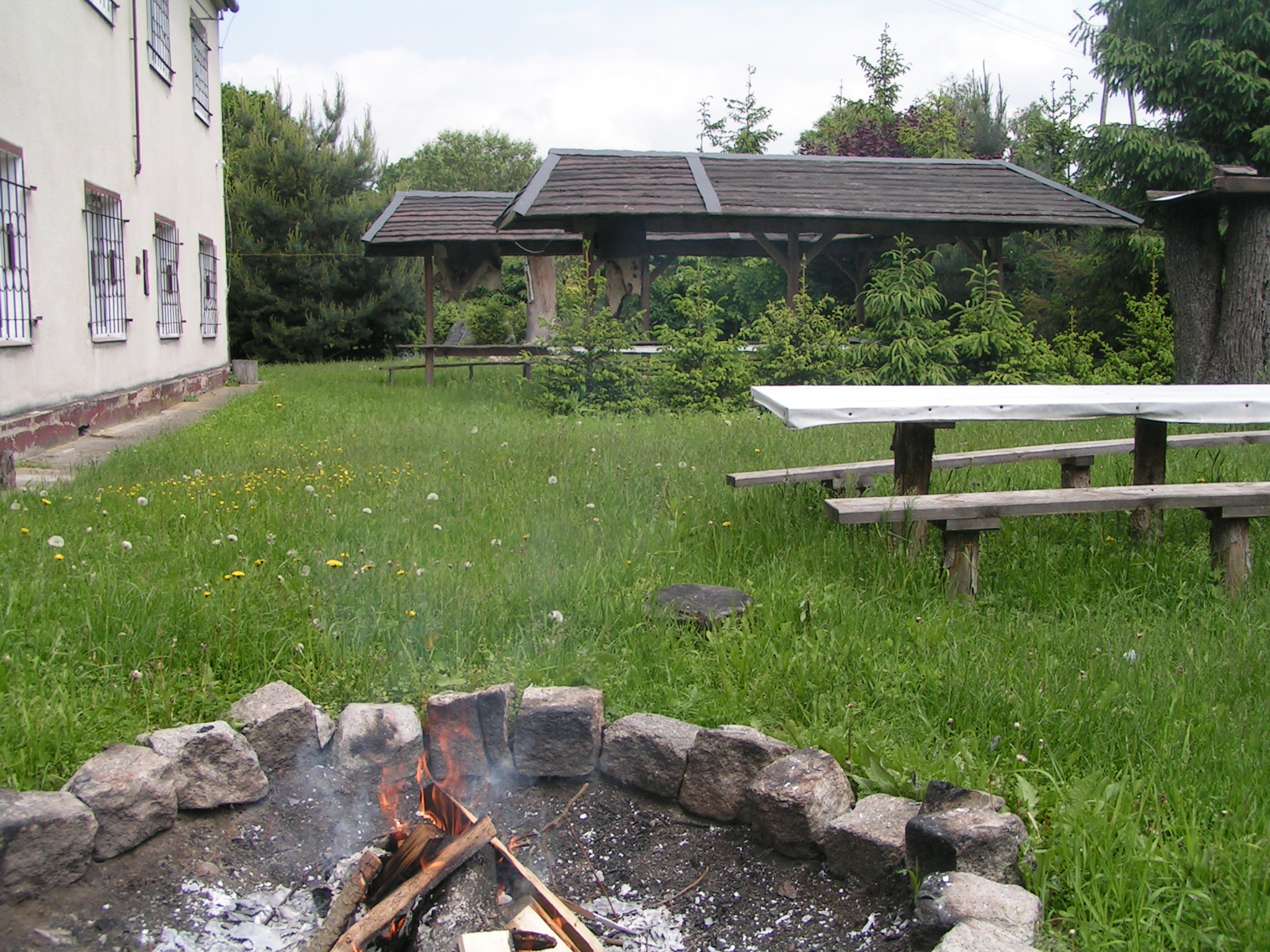 Stary Gręboszów